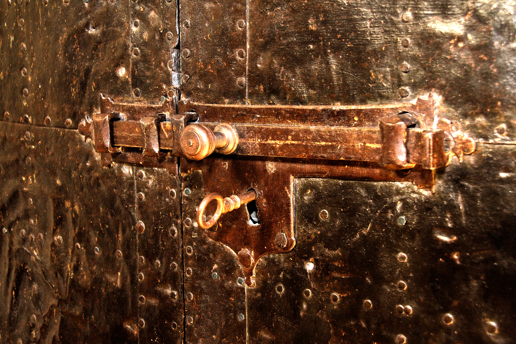 Detalle Archivo Secreto